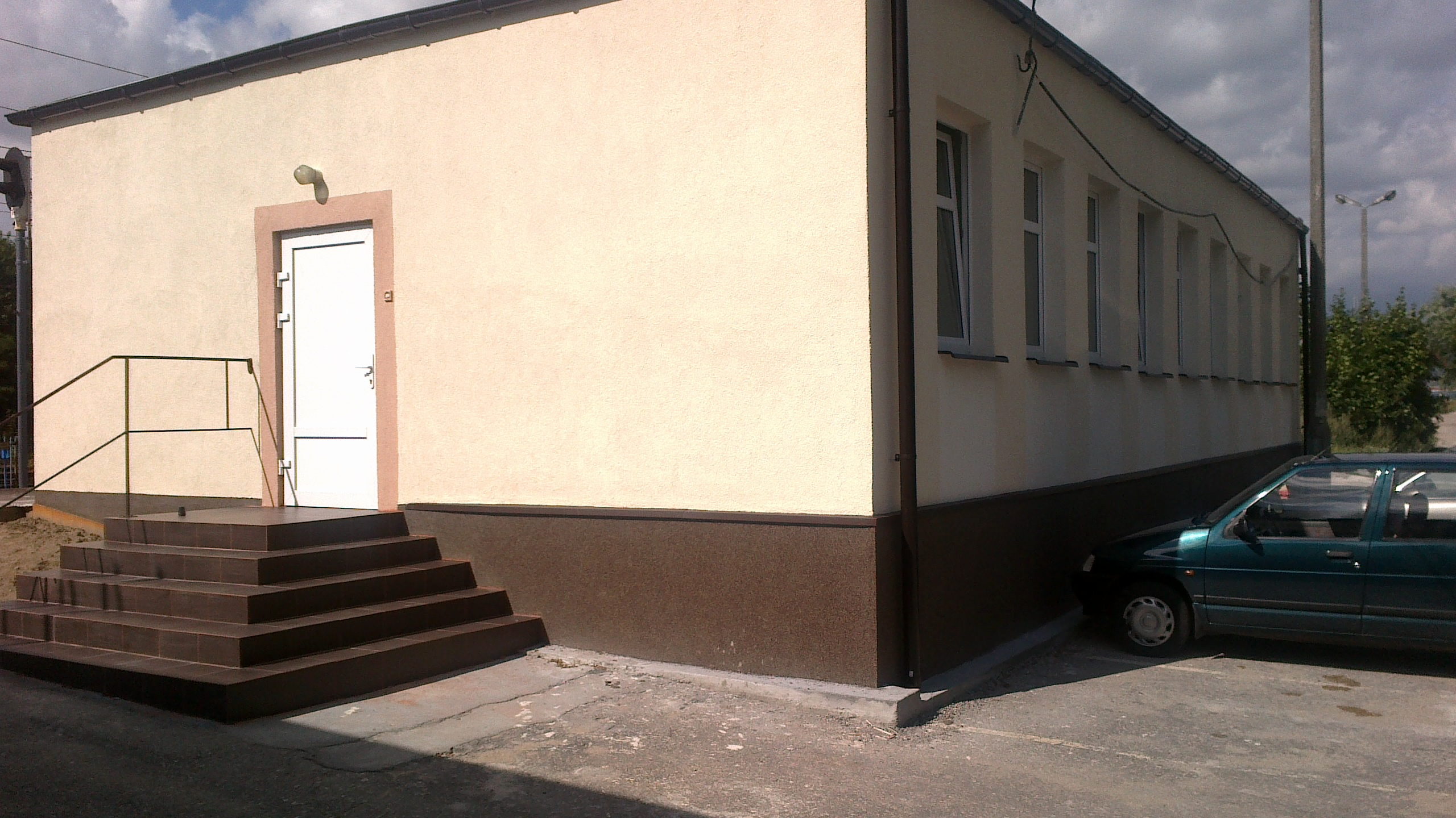 Budynek PKP Cargo (kasa towarowa) obok budynku dworca